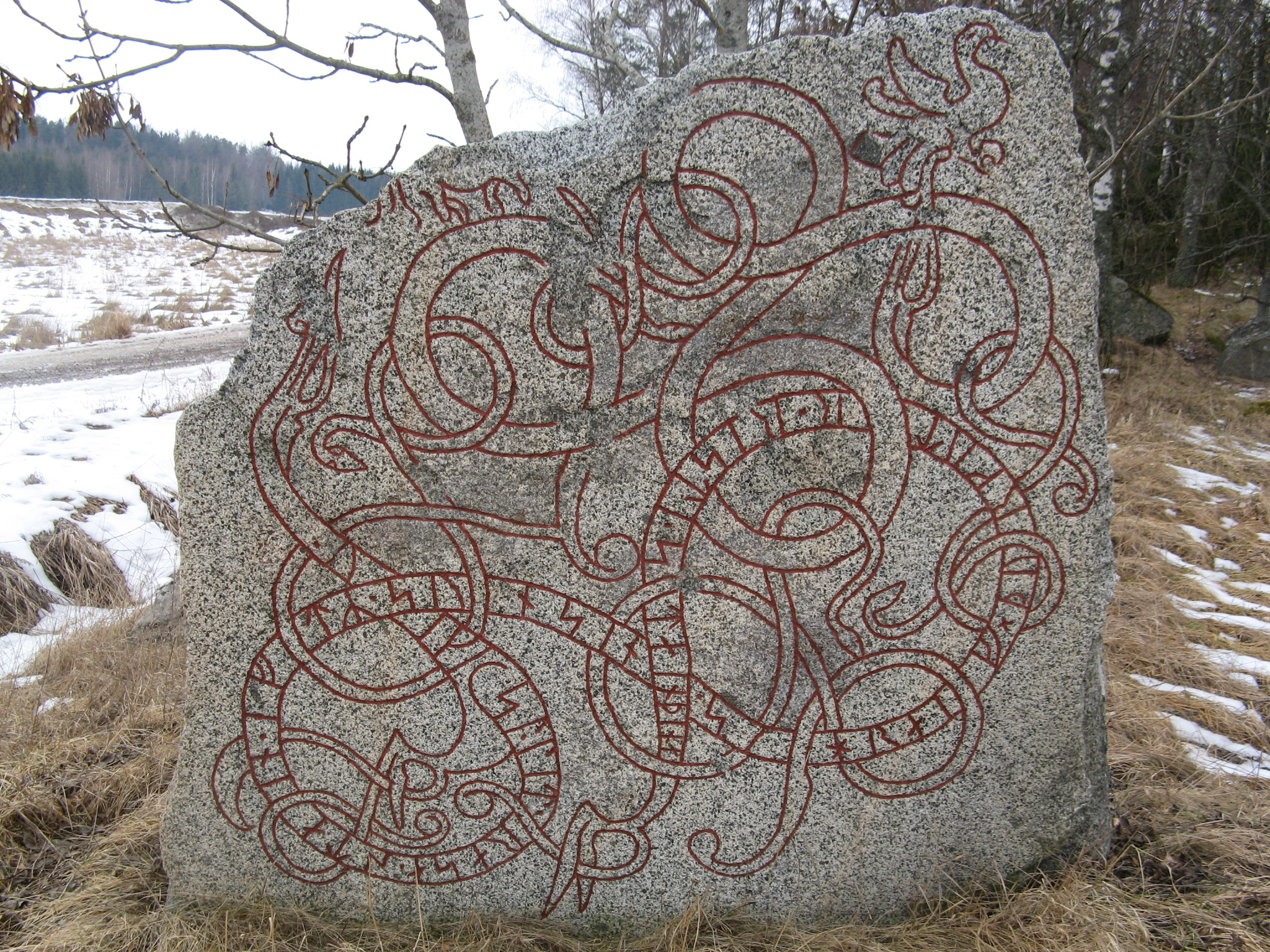 Husby-Sjutolft 90:1. (U 746). Runristning. Fast fornlämning.